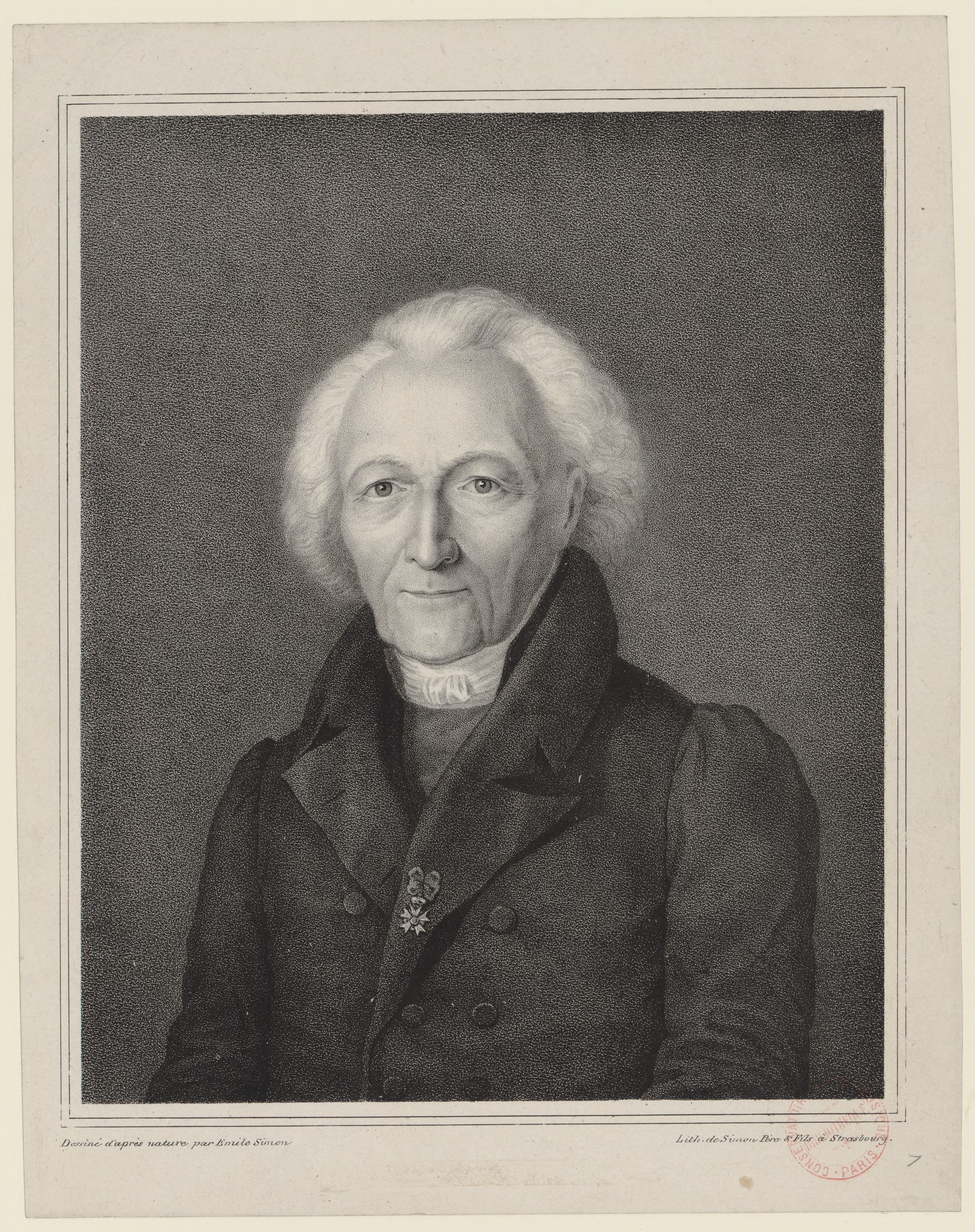 Lithographie d'Isaac Haffner (1751-1831) par Frédéric-Emile Simon (1805-1886).